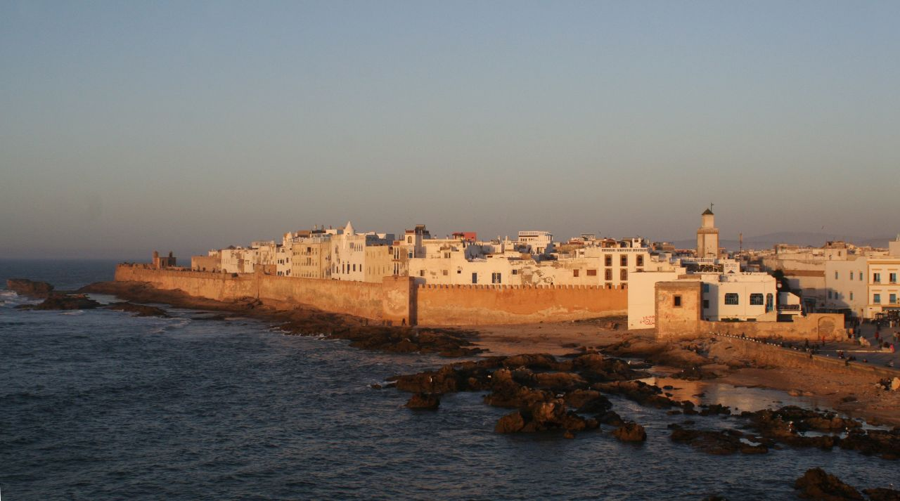 Essaouira